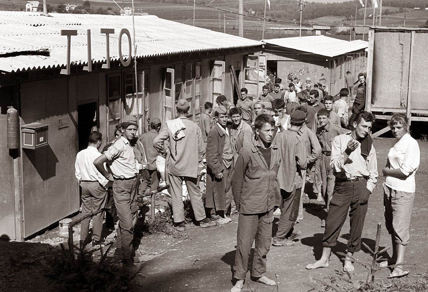 Naselje mladinskih delovnih brigad Tone Tomšič v Trebnjem na Dolenjskem